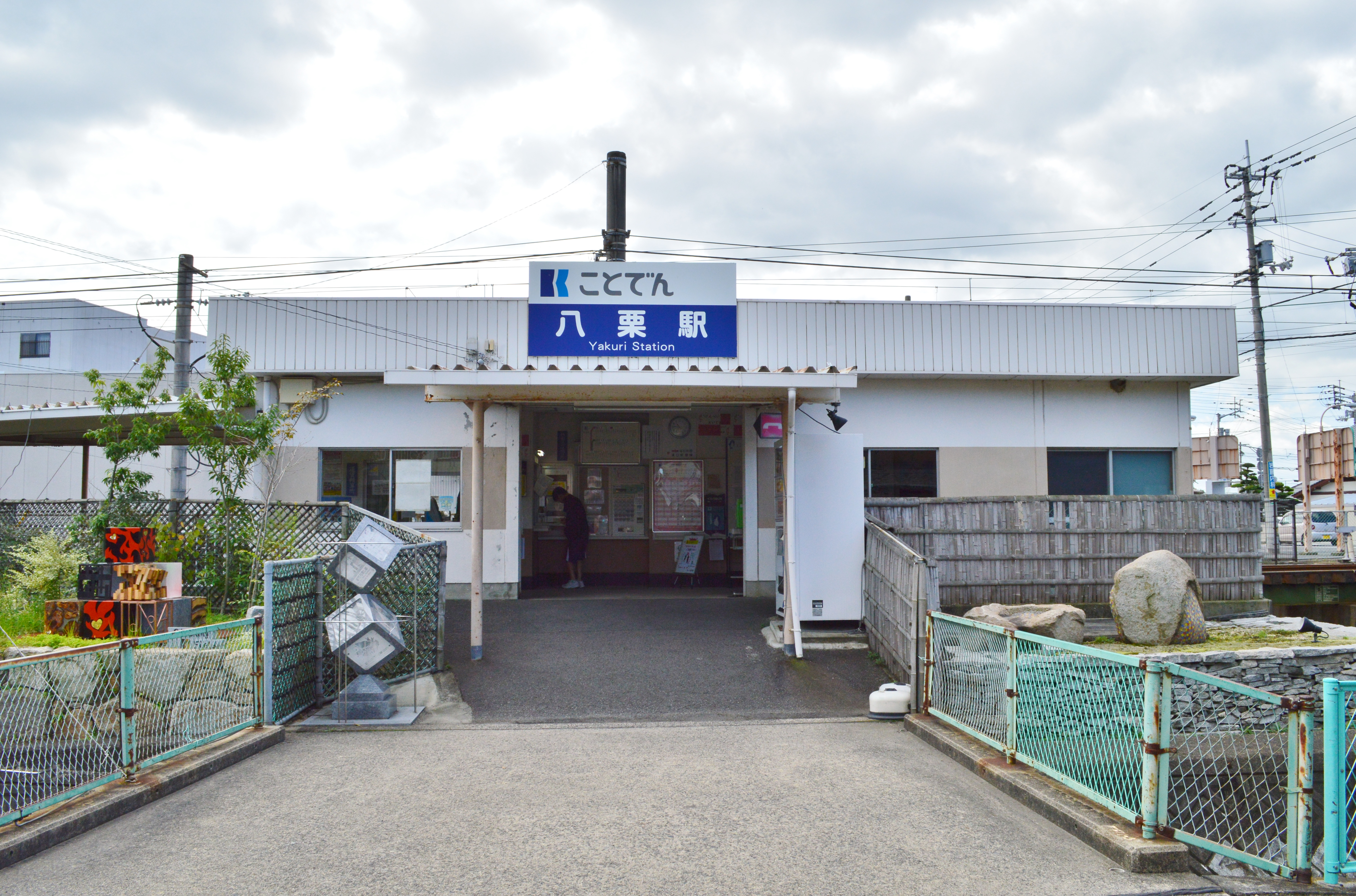 八栗駅 駅舎